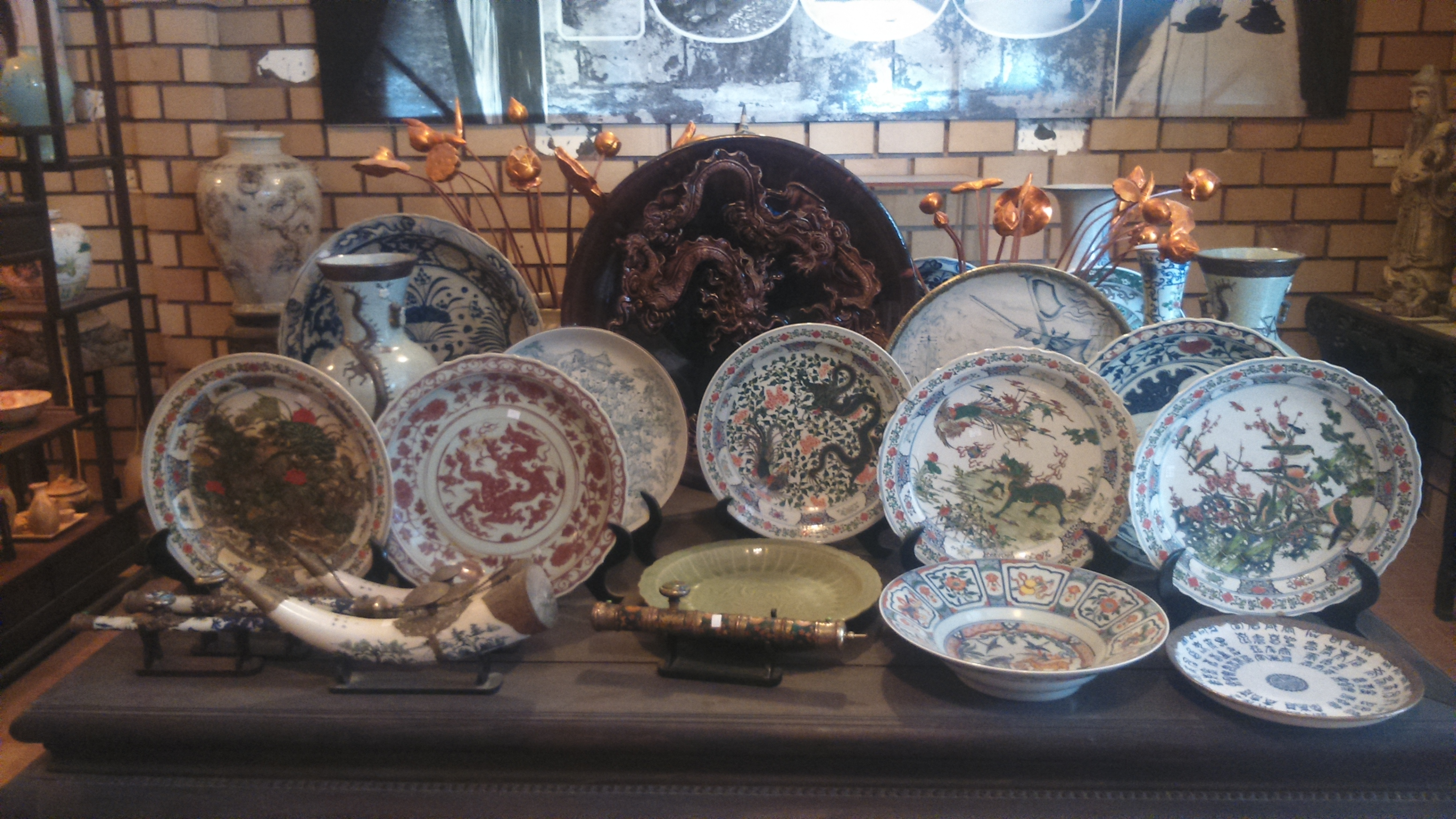 Gốm sứ Bát Tràng